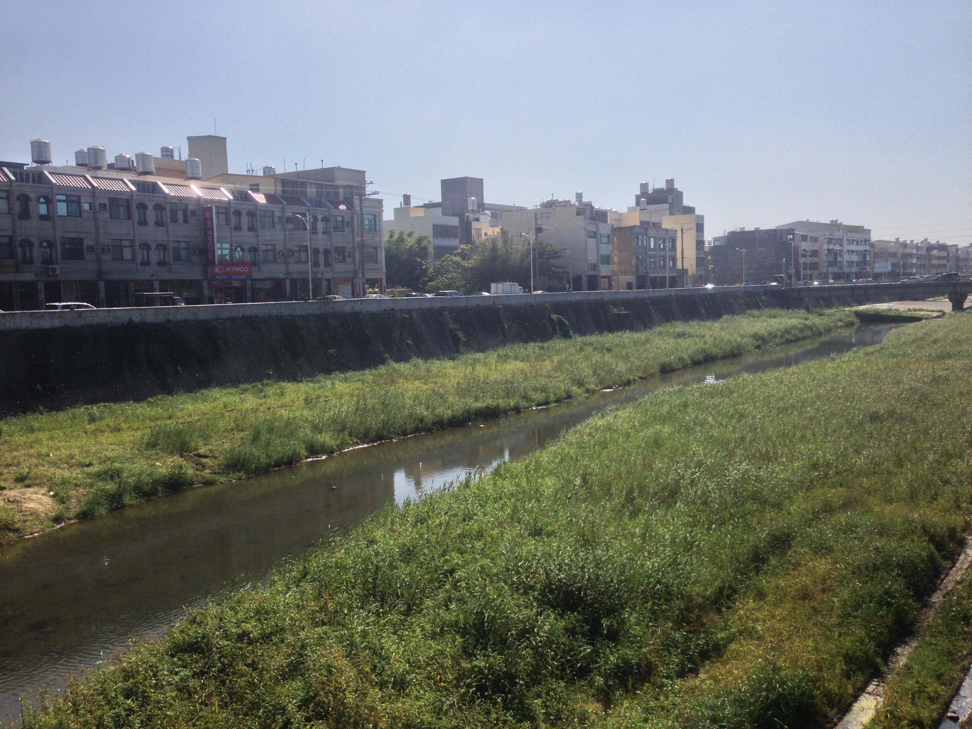 流經通霄鎮的通霄溪。